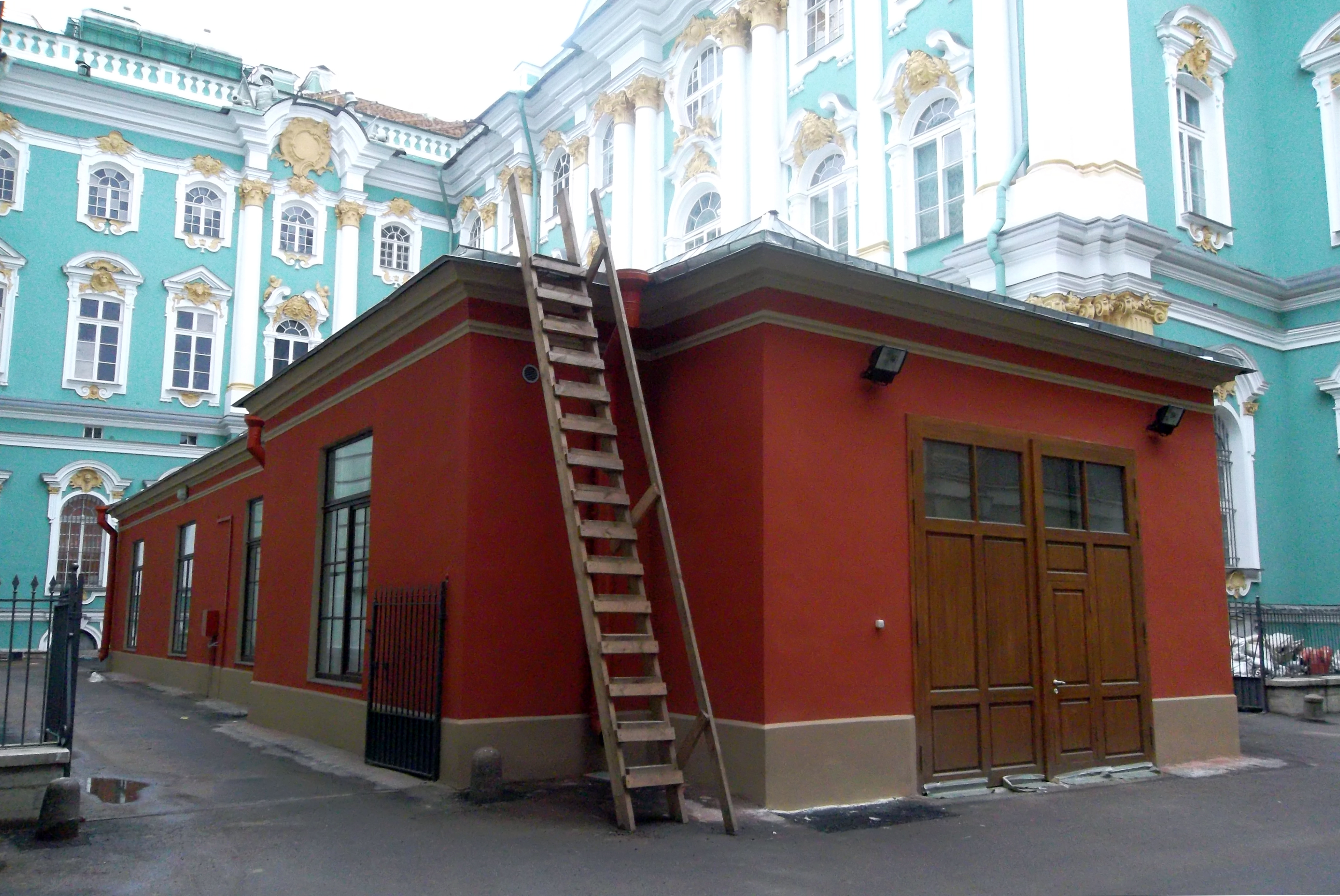 Эрмитажный Гараж построен в 1911 году по проекту архитектора Н.И.Крамского в Западине Черного проезда Зимнего Дворца. Возобновлён в 2011 году архитектором В. В. Ефимовым.